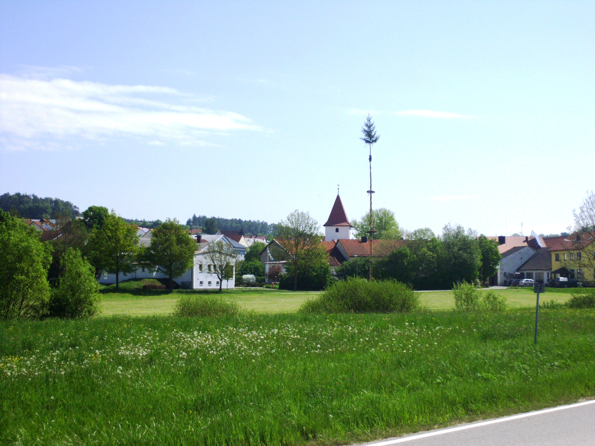 Rehlingen, Ortsteil von Langenaltheim im mittelfränkischen Landkreis Weißenburg-Gunzenhausen (Bayern)